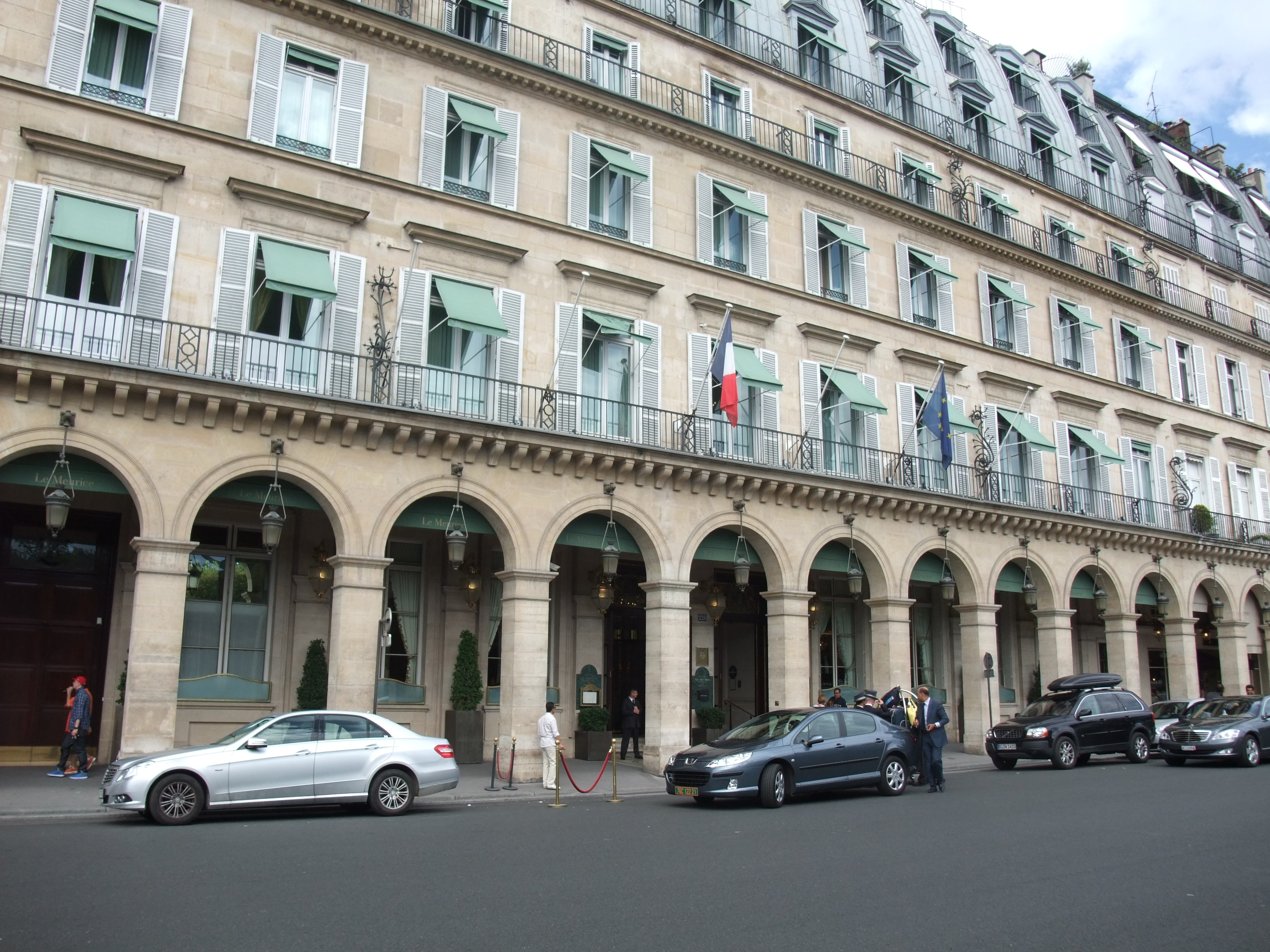 Vue sur l'Hôtel Meurice à Paris lors de l'été 2009.